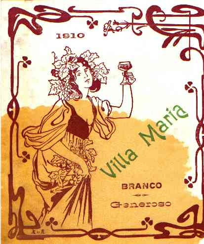 Rotulo de 1910 utilizado nas garrafas da adega da Villa Maria onde era engarrafado o vinho das propeiedades do morgado João Inácio de Bettencourt Noronha produzido ilha de São Jorge e na ilha Terceira